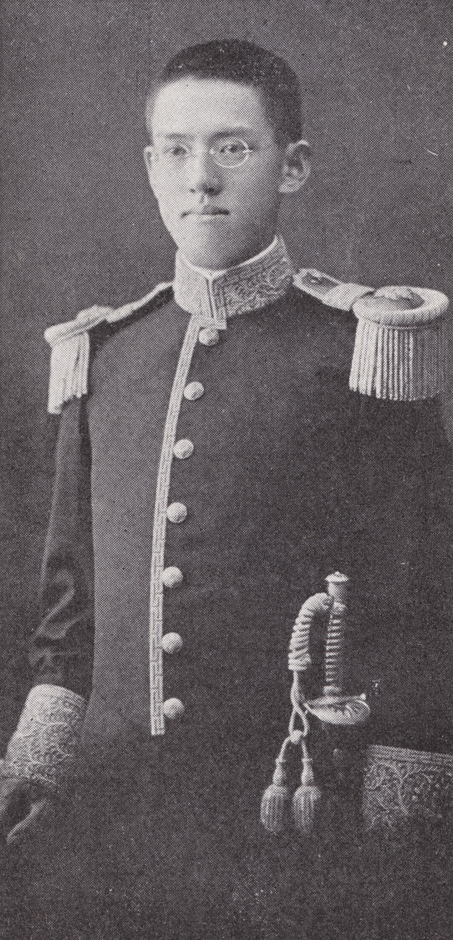 大礼使典儀官・主猟官・伯爵坊城俊良